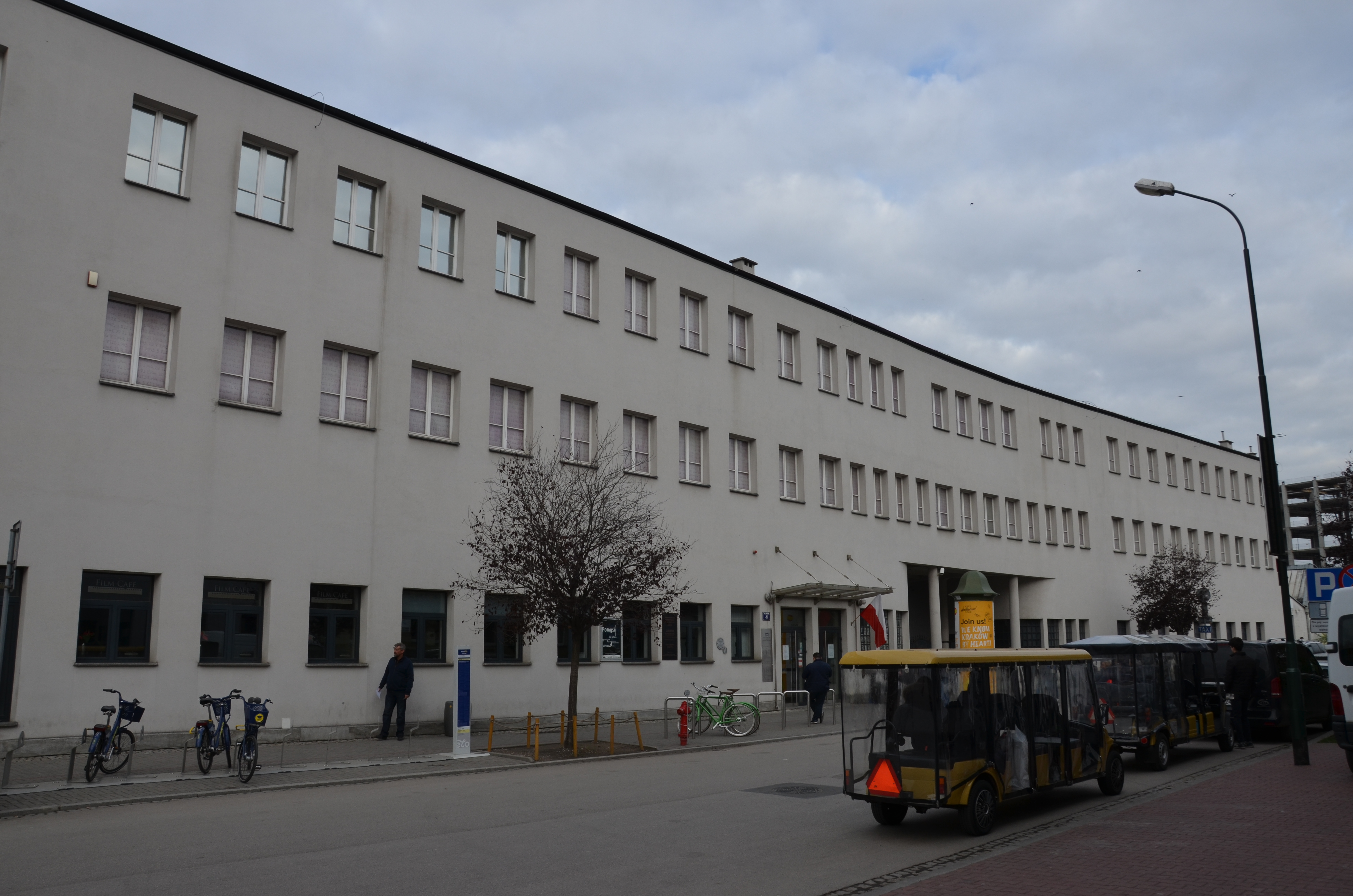 De emaillefabriek van Oskar Schindler in Krakau.